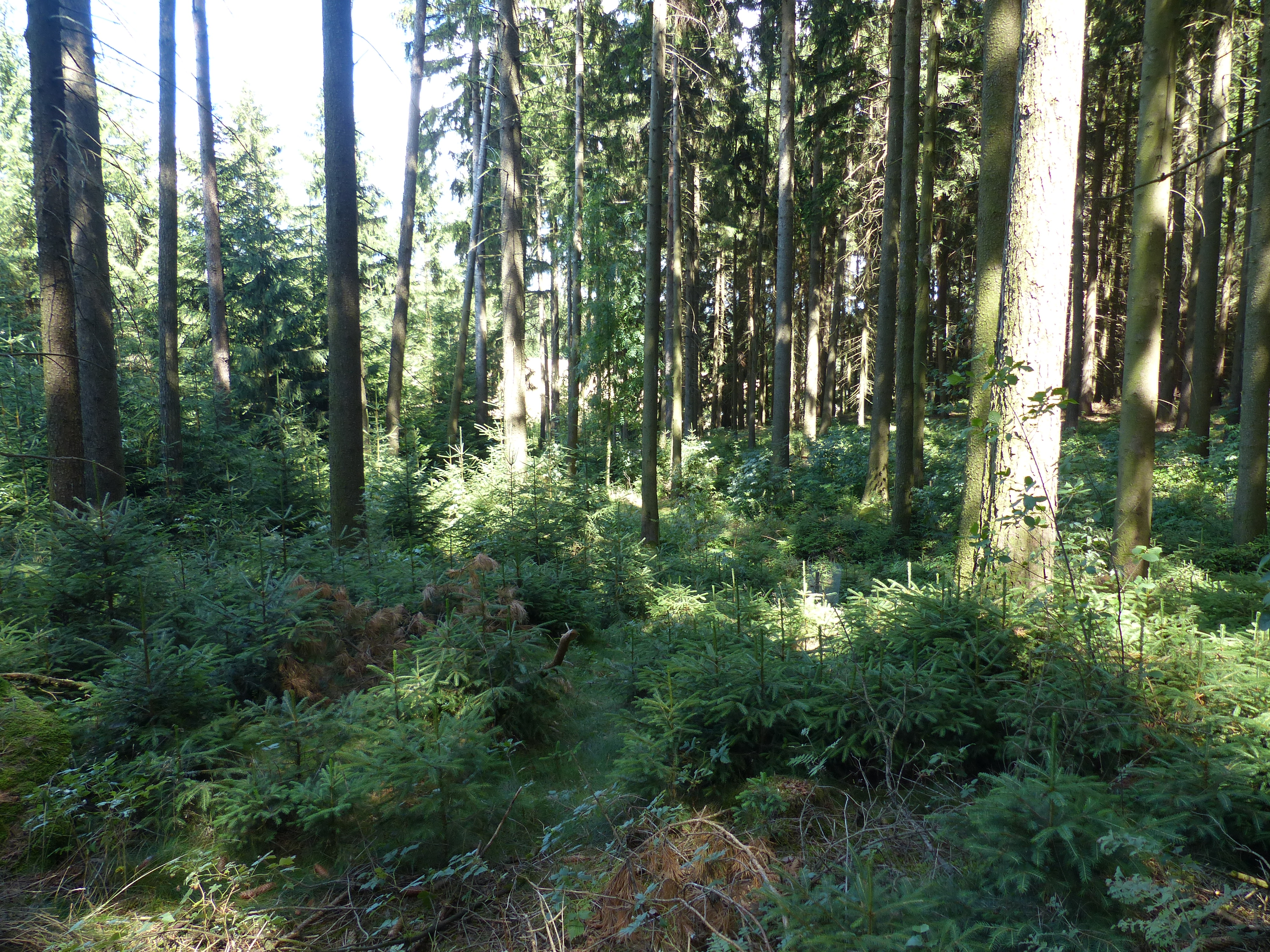 Gelände der Grube Christa